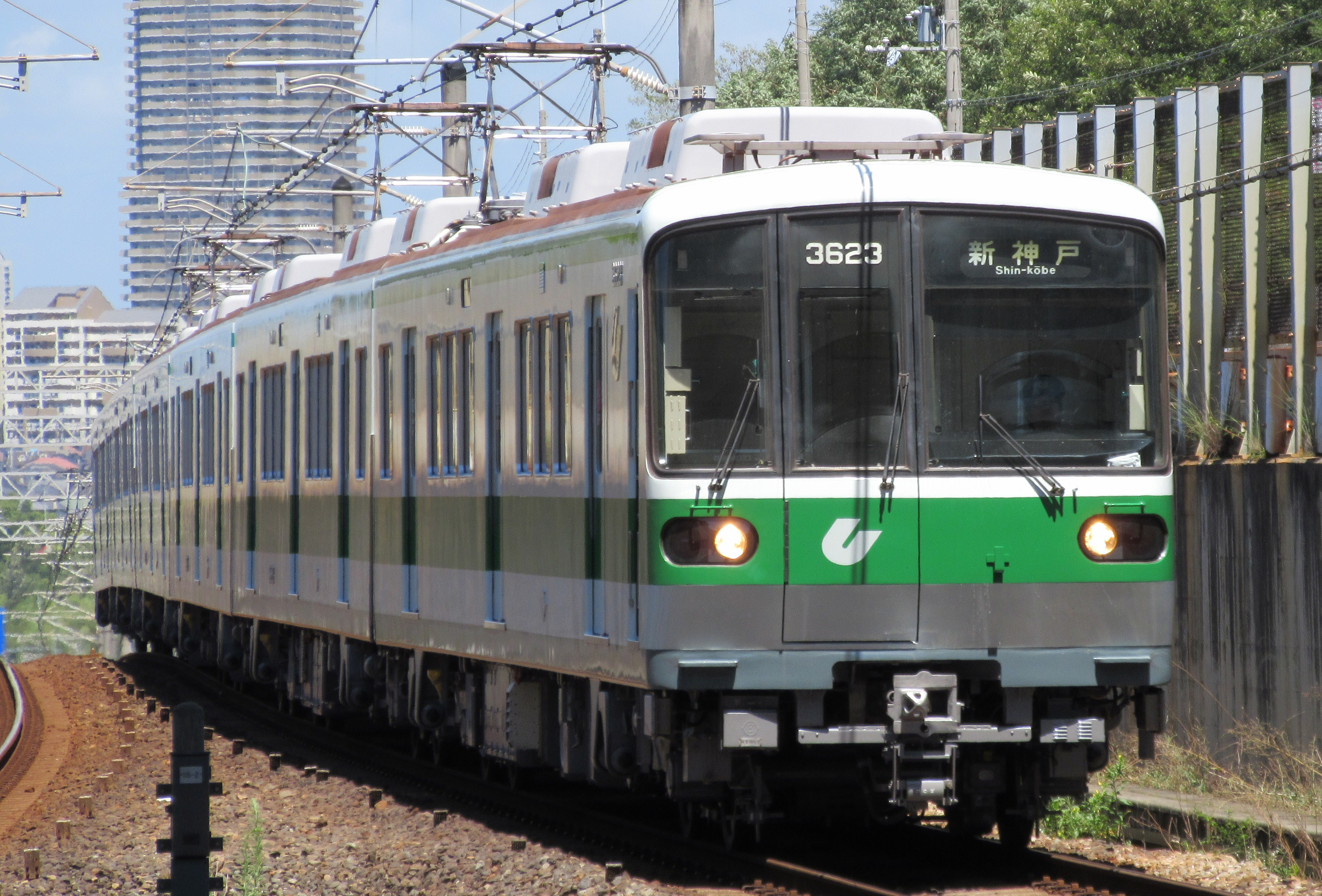 神戸市営地下鉄3623編成(西神南駅にて)